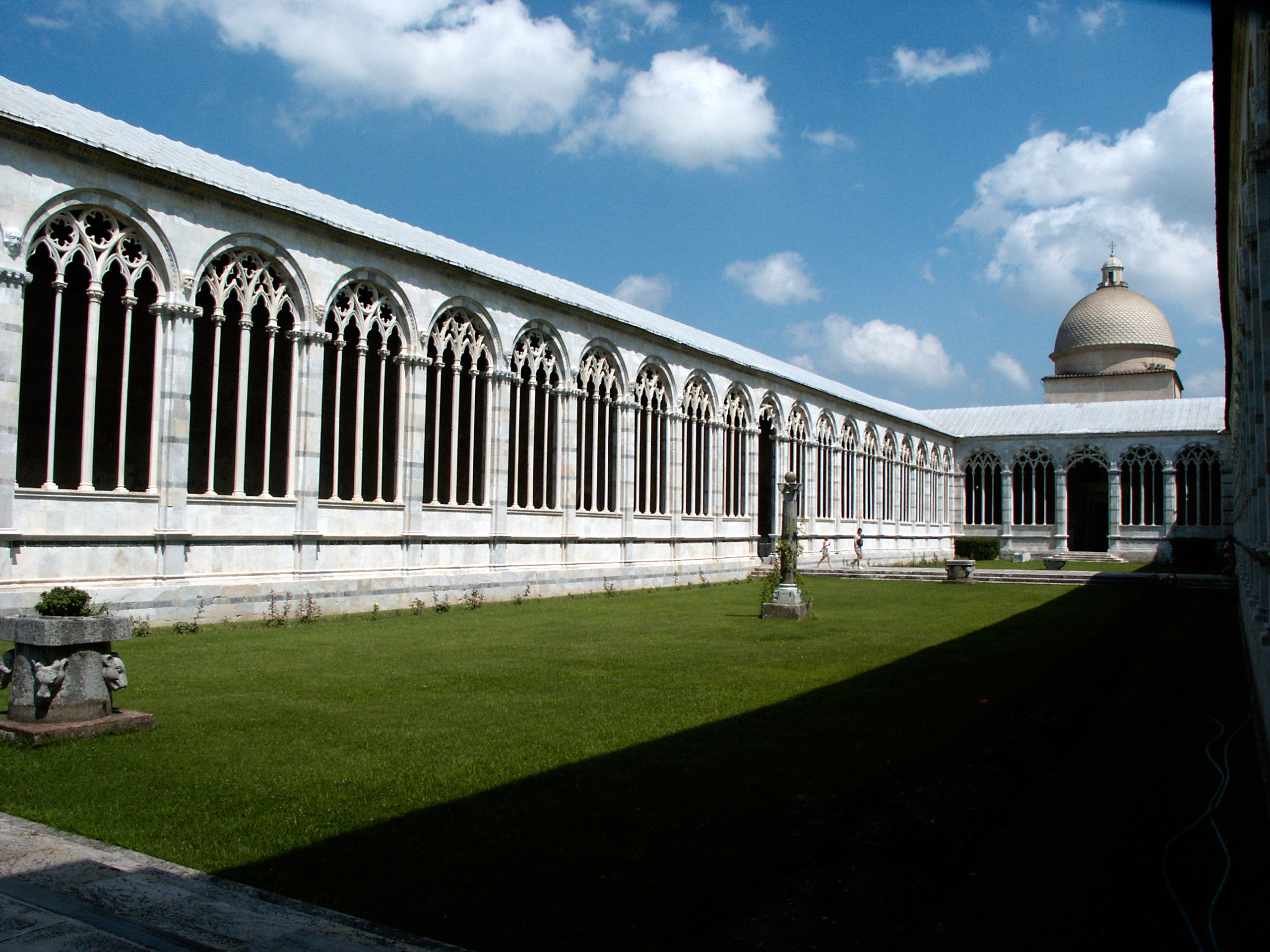 Camposanto à Pise